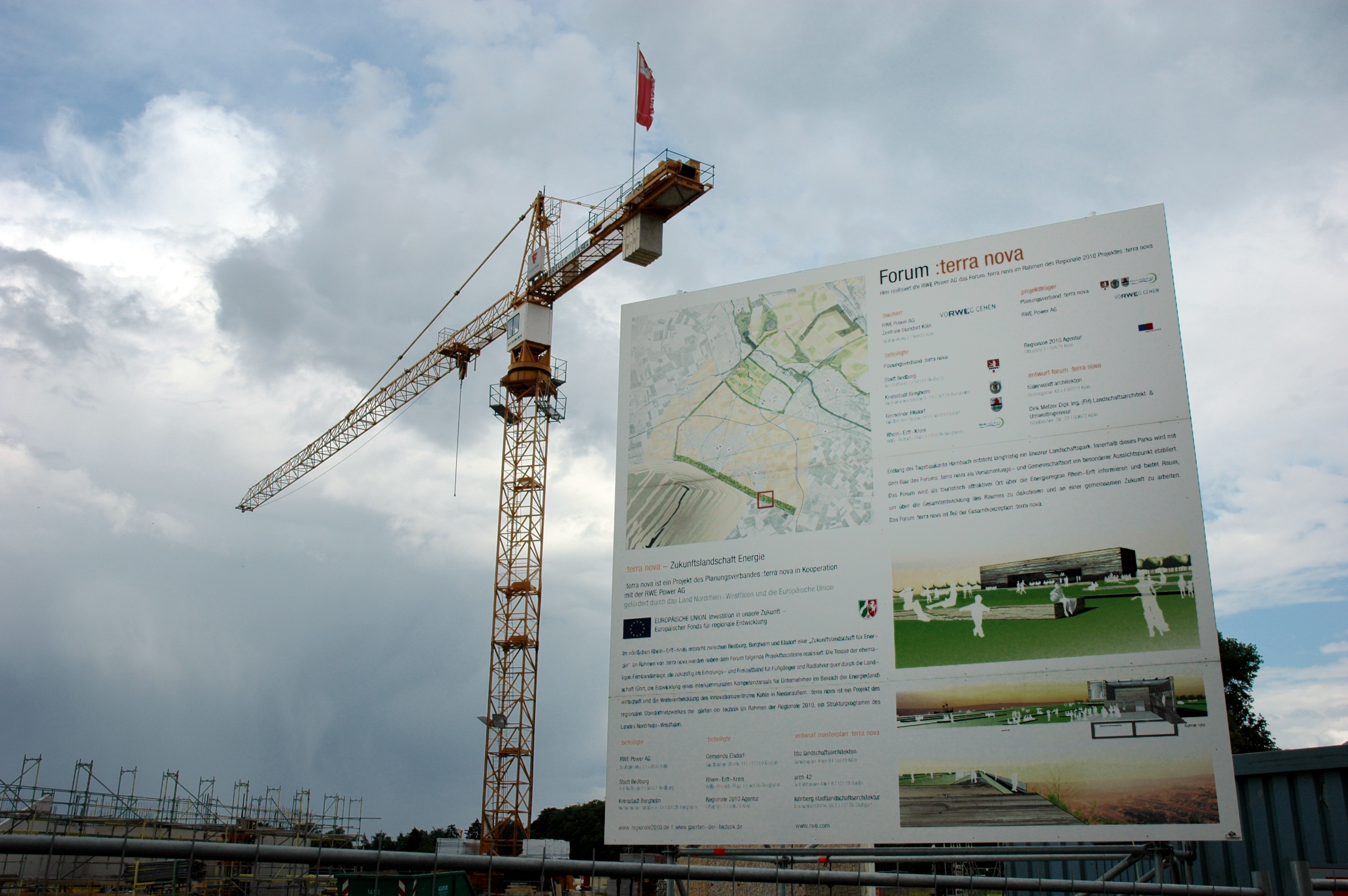 Bautafel an der Baustelle des Tagebau-Besucherzentrums Forum :terra nova am Tagebau Hambach bei Elsdorf